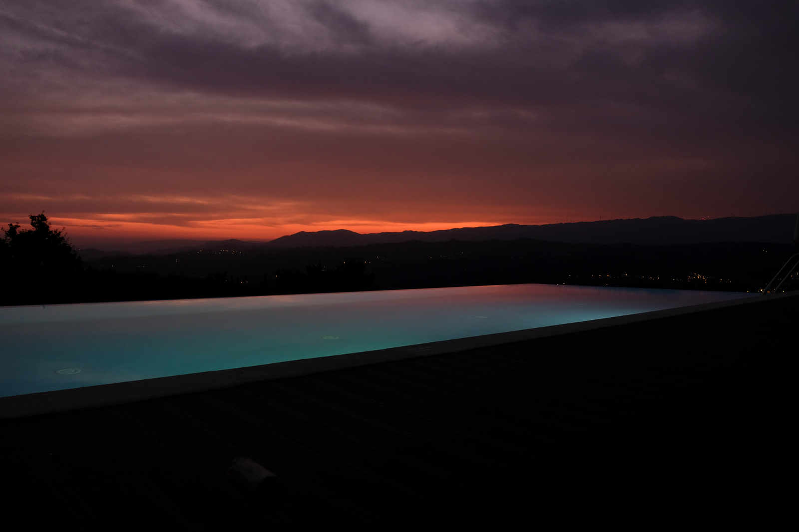 Serras da Freita e Arada. Por do sol na Serra da Arada. Vista de Figueiredo das Donas. This is a photography of a protected area of Portugal indexed in the World Database on Protected Areas with the ID: 555531116 (WDPA)